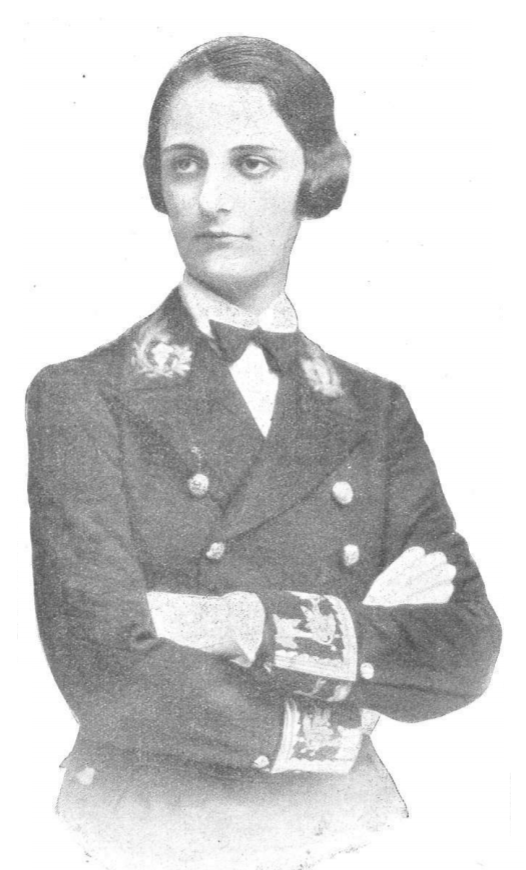 Pilar Careaga